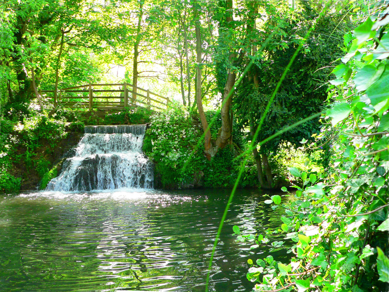 La Souchez